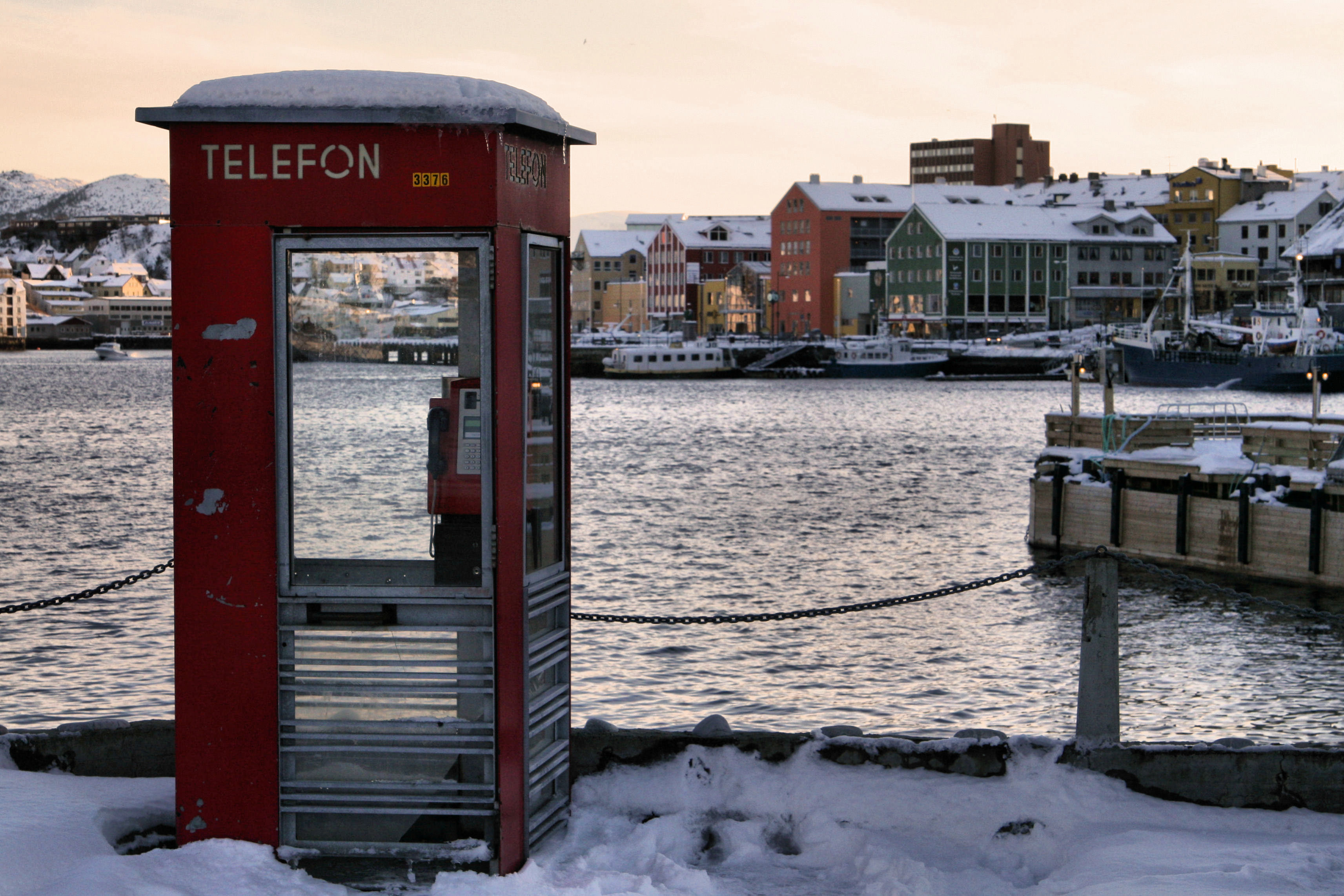 Maaart 2006 in de haven van Kristiansund